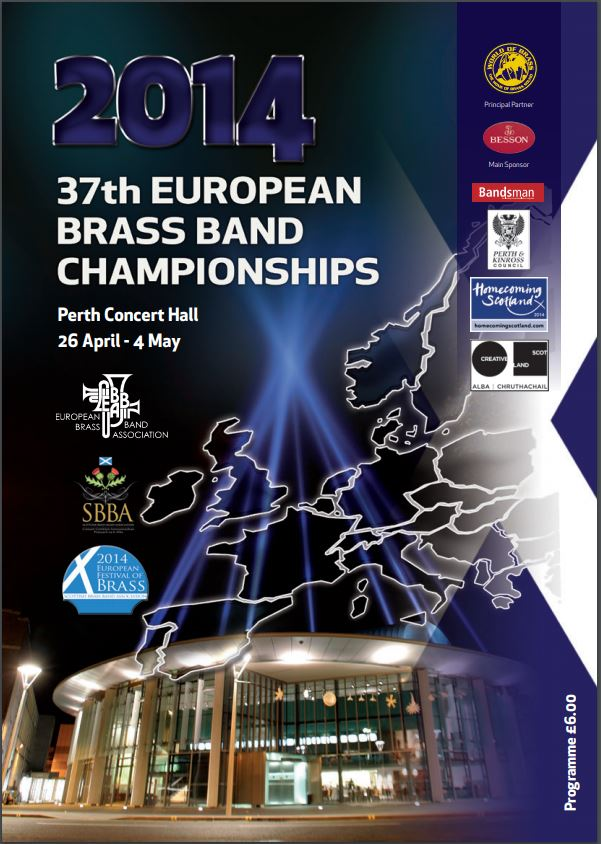 Forside programhefte EM brass 2014